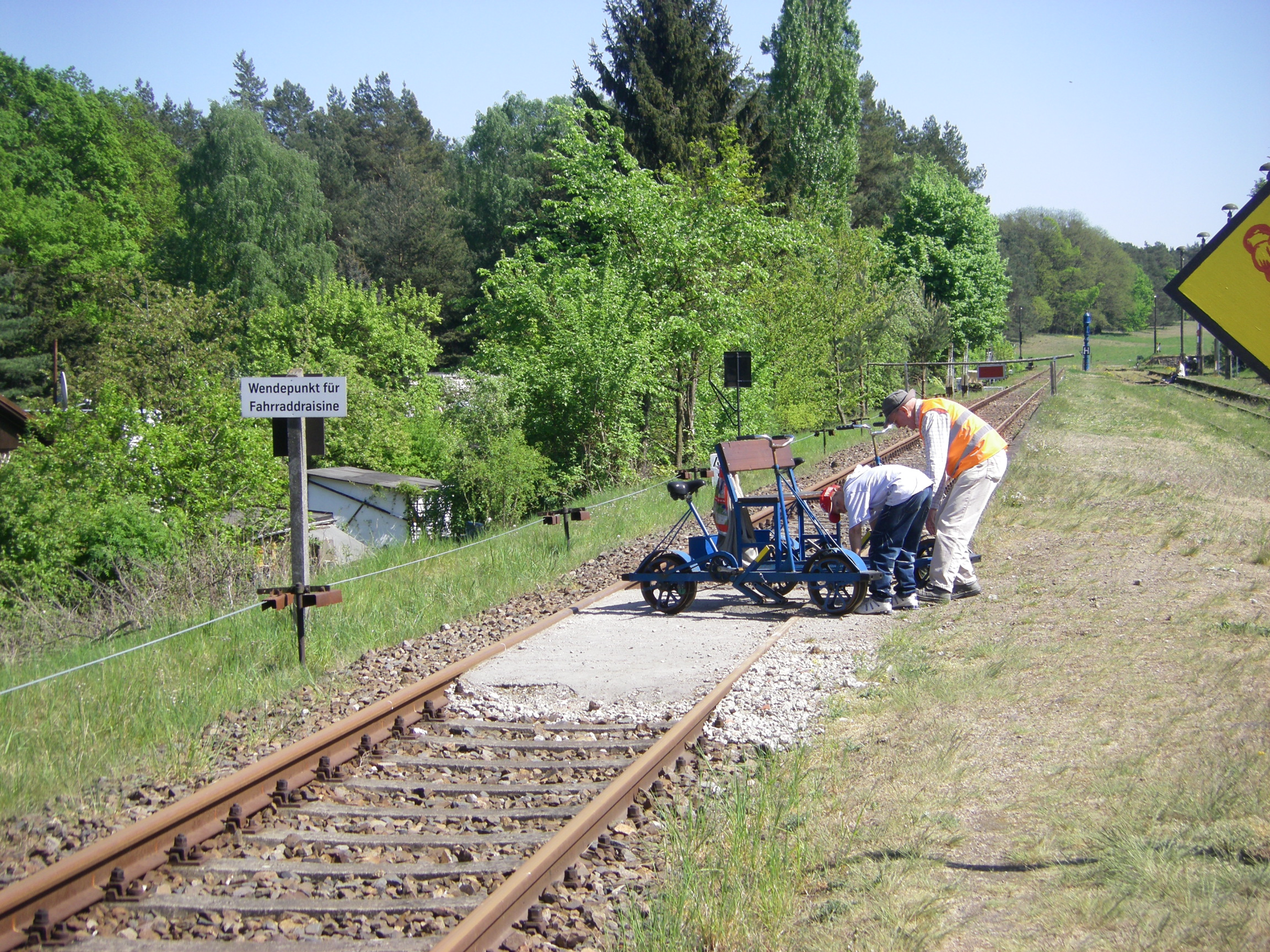 Wriezener Bahn 2009 Draisinen-Wendestelle am Bahnhof Sternebeck